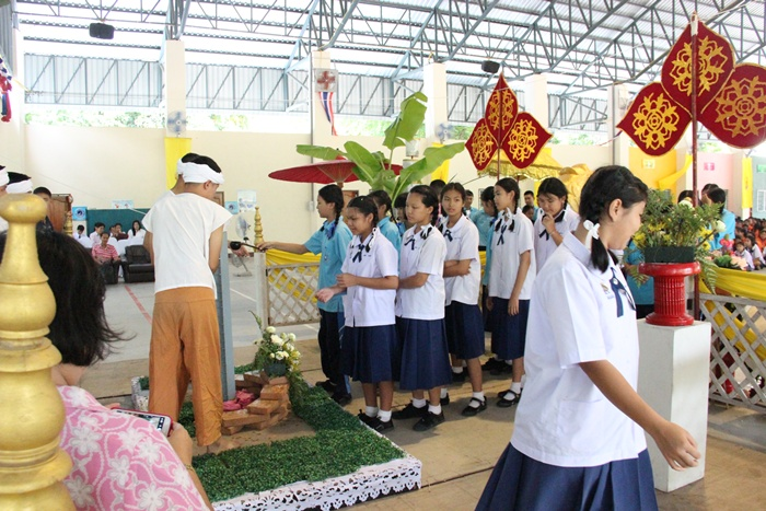 พิธีหล่อเทียนพรรษา ส.ว. 2557